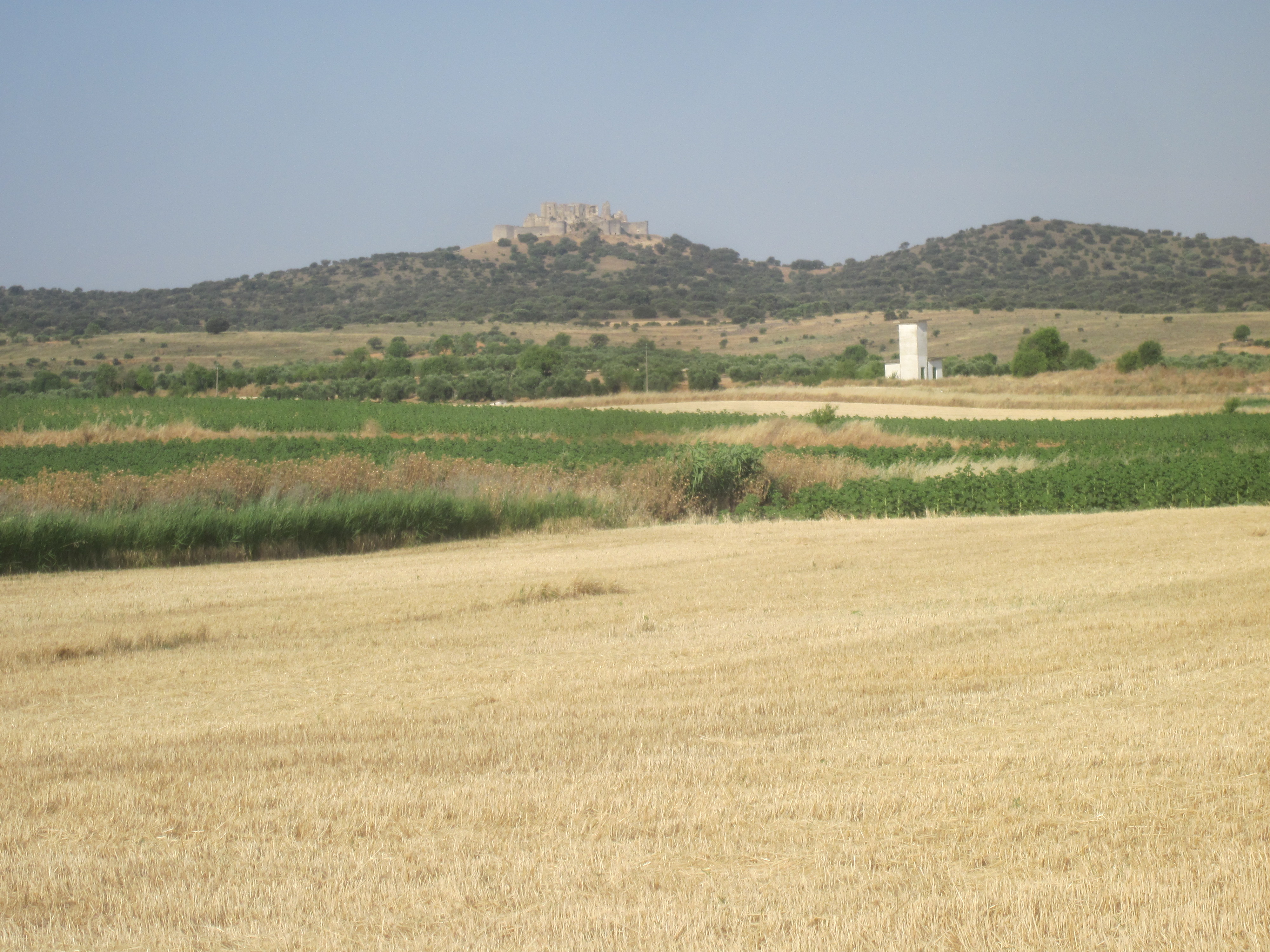 Vista de La Pesquera, las olivas y el castillo. Puebla de Almenara. Cuenca